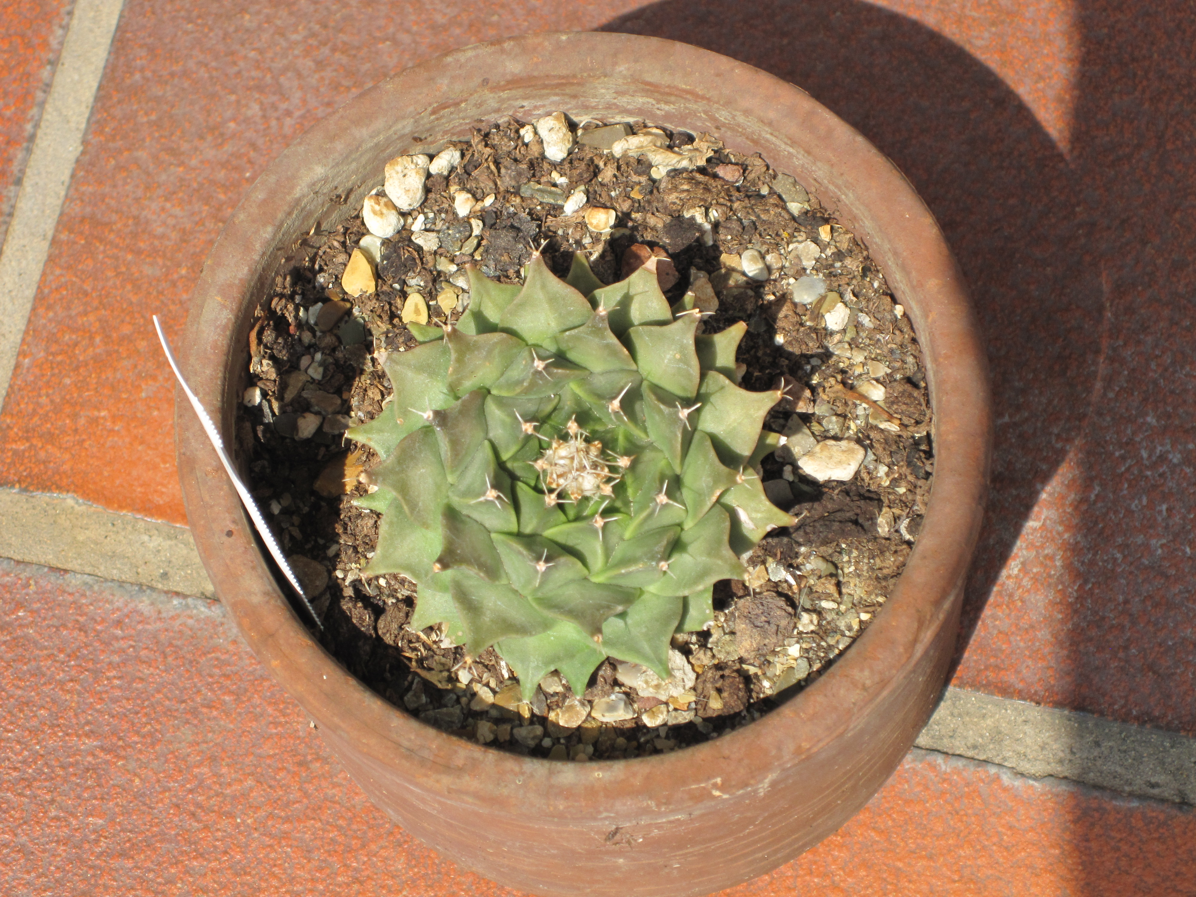 Obregonia denegrii della mia collezione